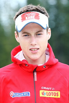 Adam Cieślar, autor: Alicja Kosman